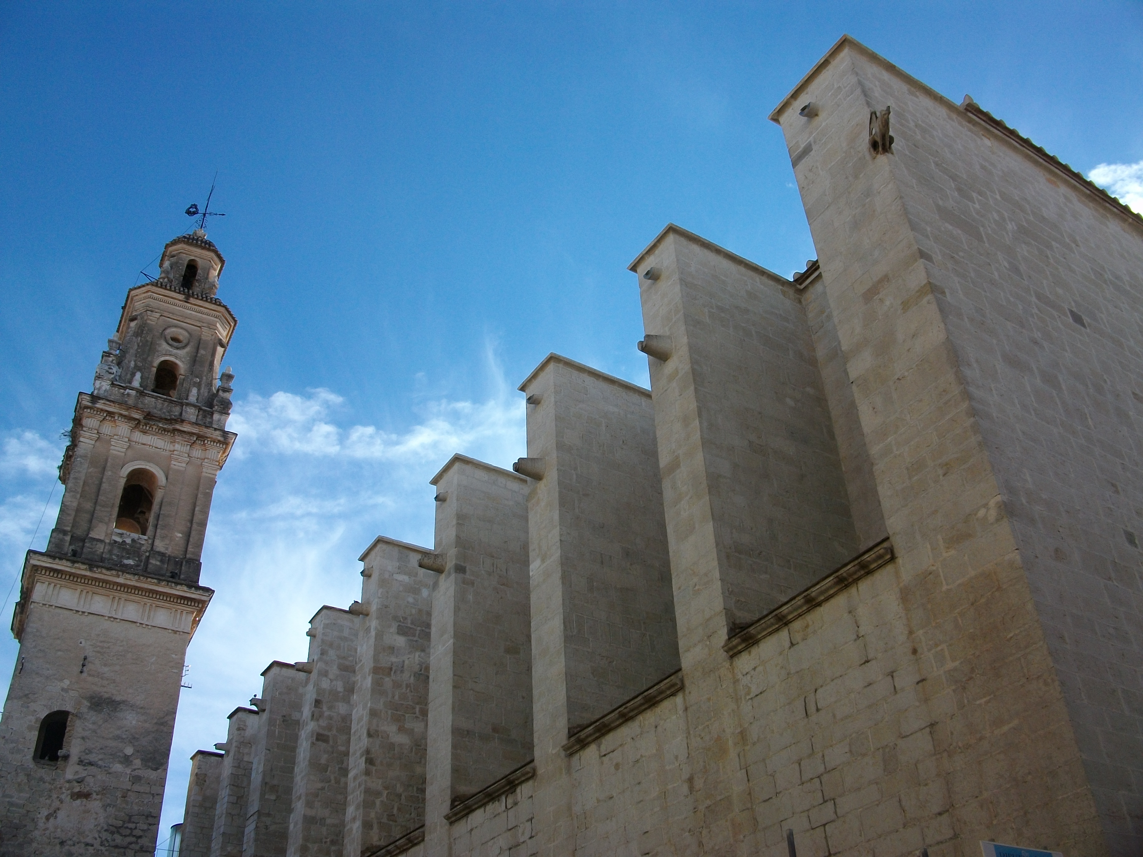 Seu Col·legiata de Santa Maria de Gandia, la Safor, País Valencià. Vista del campanar i els contraforts.